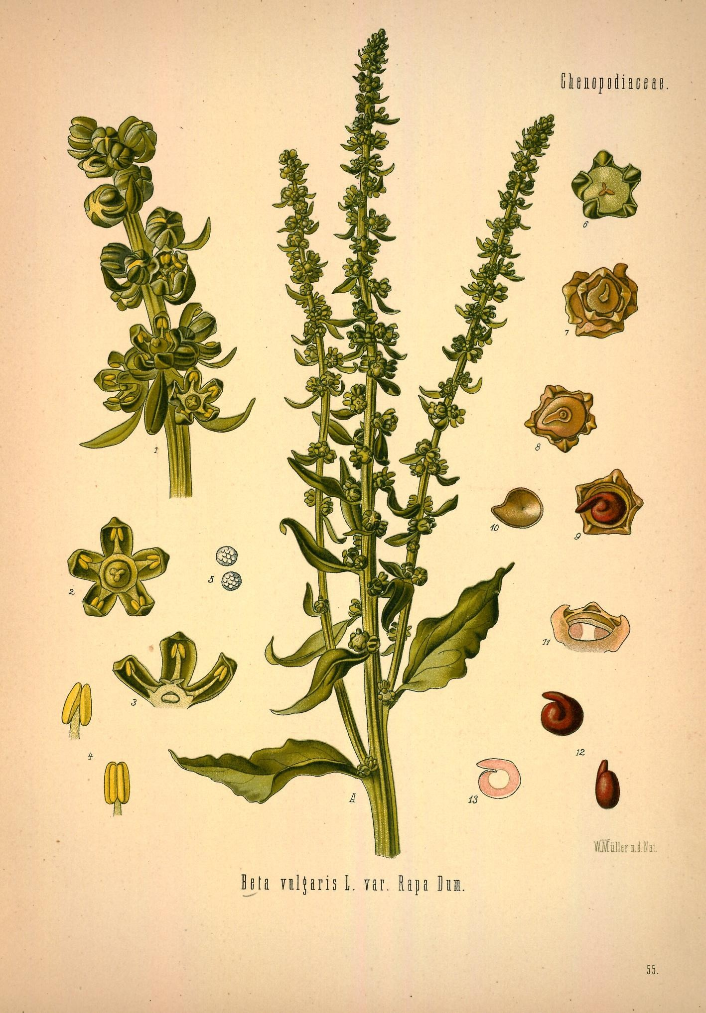 Runkelrübe. A oberer Theil der blühenden Pflanze in natürl. Grösse; 1 Theil der Blüthenähre, vergrössert; 2 Blüthe von oben, desgl.; 3 dieselbe im Längsschnitt, desgl.; 4 Staubgefäss, desgl.; 5 Pollen, desgl.; 6 junge Frucht, desgl.; 7, 8, 9 reife Frucht, desgl.; 10 dieselbe im Querschnitt ohne Perigon; 11 desgl. mit Perigon; 12 Same von verschiedenen Seiten, desgl.; 13 derselbe zerschnitten.